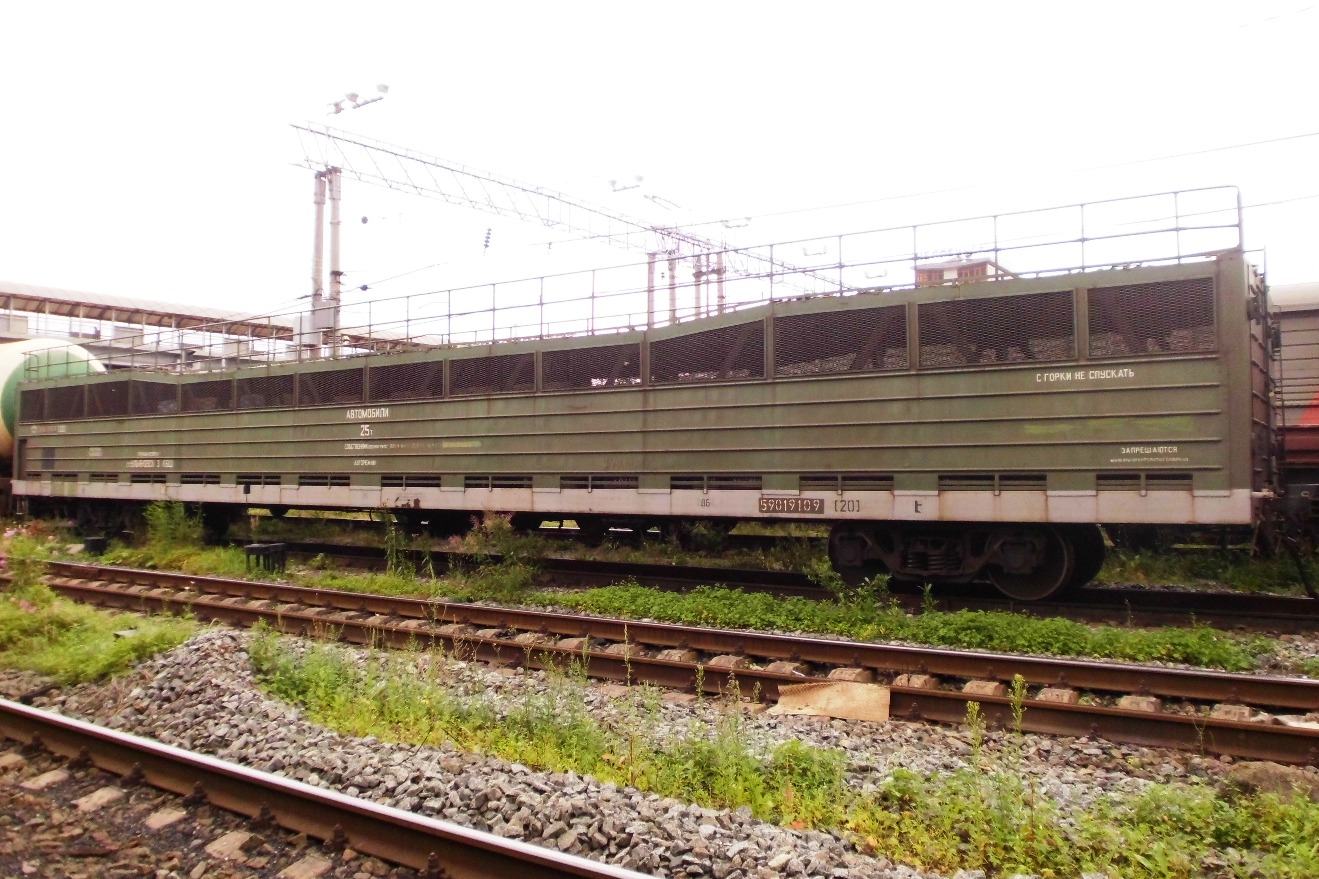 Платформа двухъярусная для автомобилей модель 13-9752, Торжокский вагоностроительный завод, построенный в 2007 году.